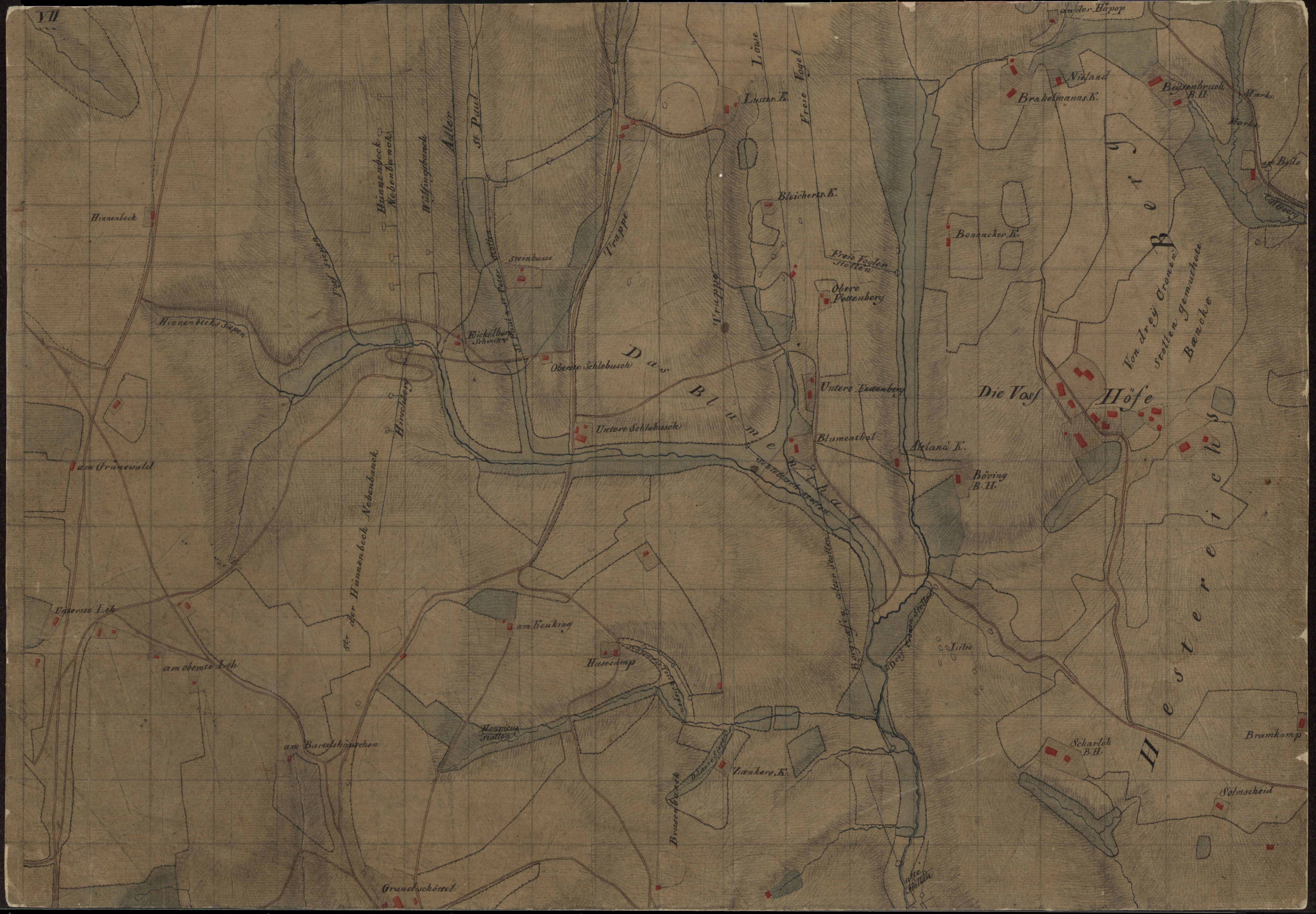 Spezialkarte des Bergwerkdistrikts Wetter. Nachdruck als „Carte speciale des mines“.